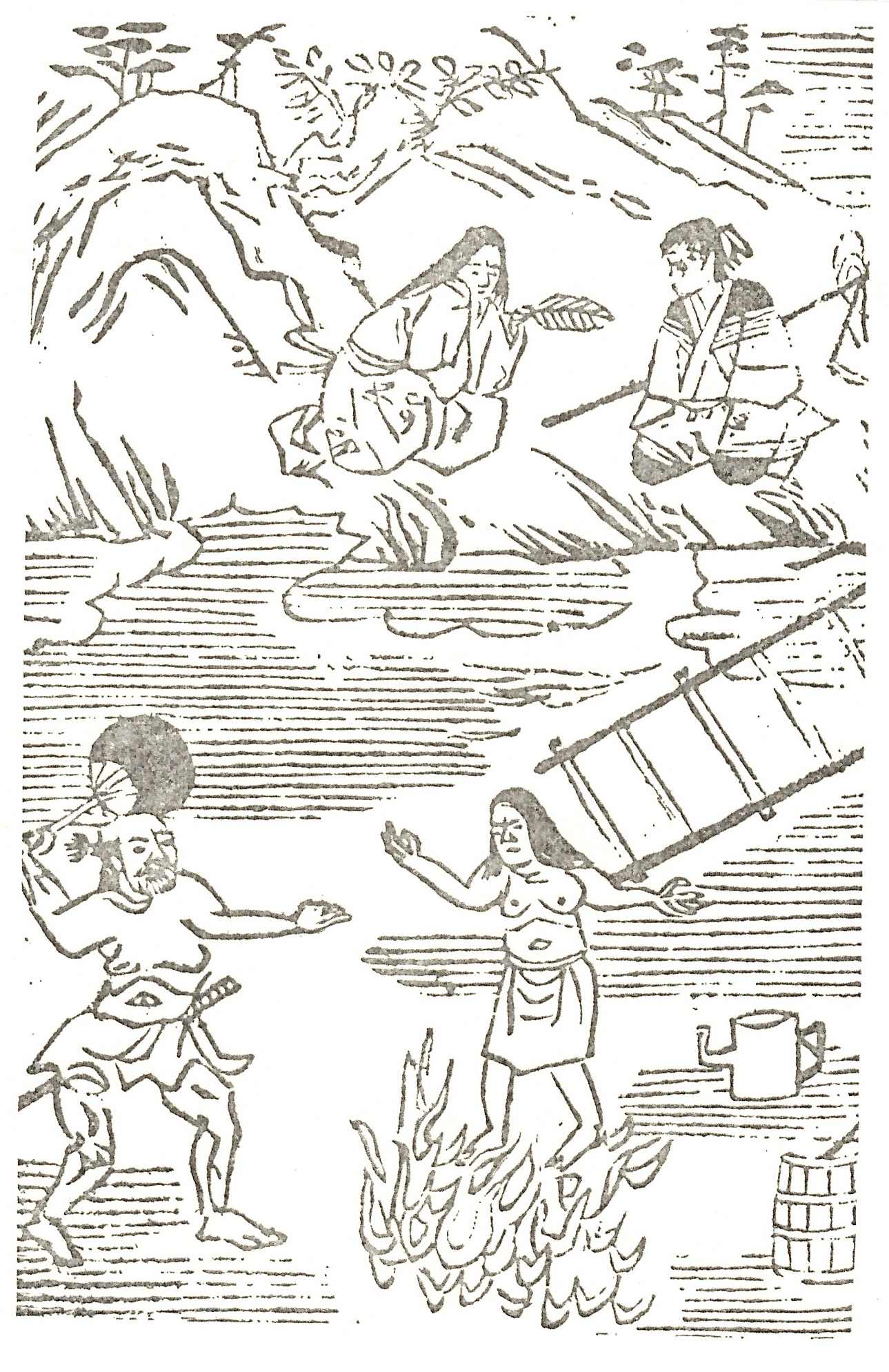 天下一説経与七郎正本『さんせう太夫』（寛永16年（1639年）頃刊行）